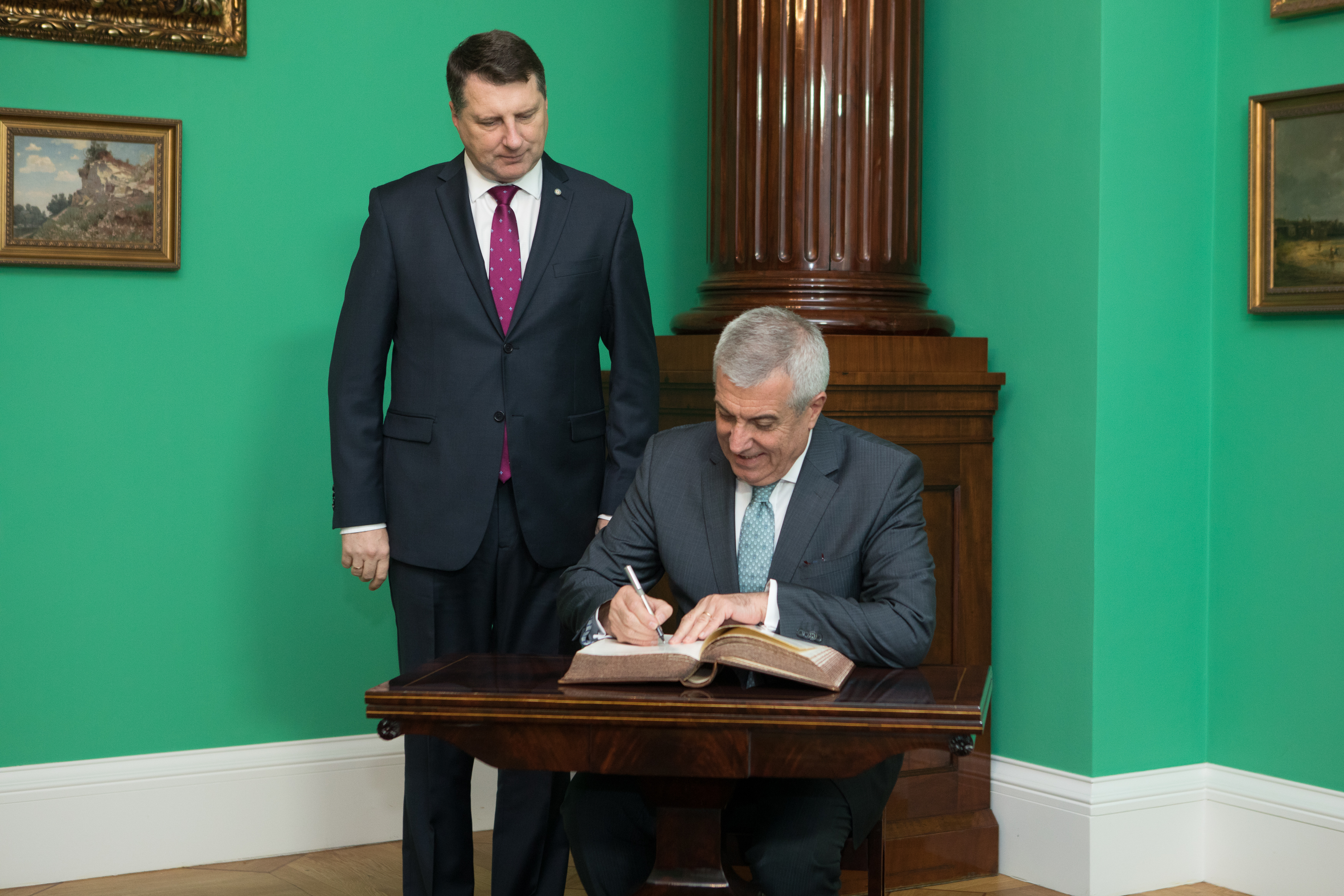 2017.gada 24.oktobris. Rumānijas parlamenta Senāta prezidents Kelins Popesku-Teričanu (Călin Popescu-Tăriceanu) tiekas ar Valsts prezidentu Raimondu Vējoni. Foto: Ernests Dinka, Saeimas Administrācija Izmantošanas noteikumi: saeima.lv/lv/autortiesibas